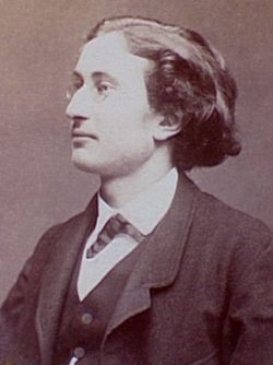 Gaston Da Costa (1850-1909)